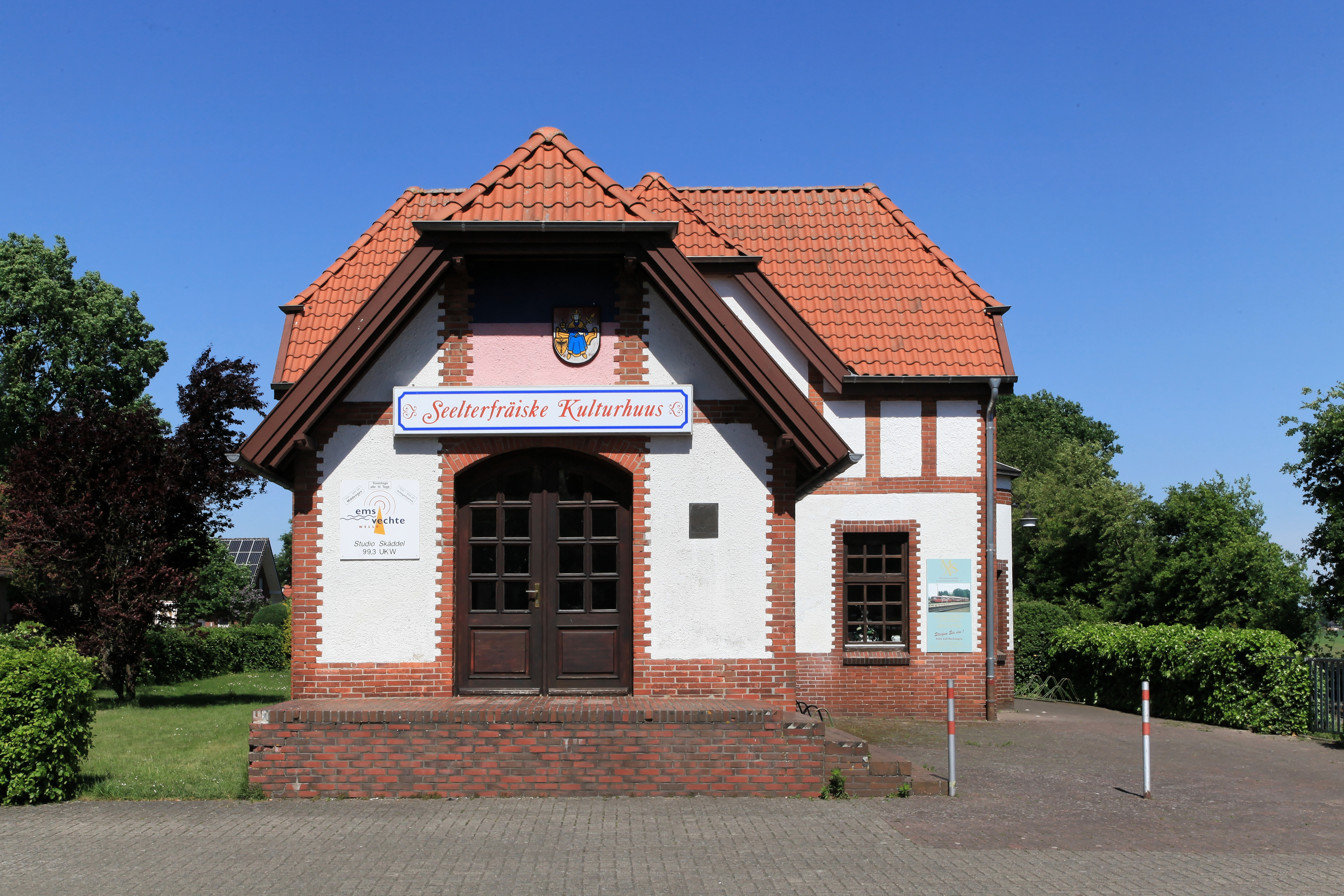 Ehemaliger Bahnhof, jetzt Heimathaus, Eisenbahnstraße in Scharrel, Saterland